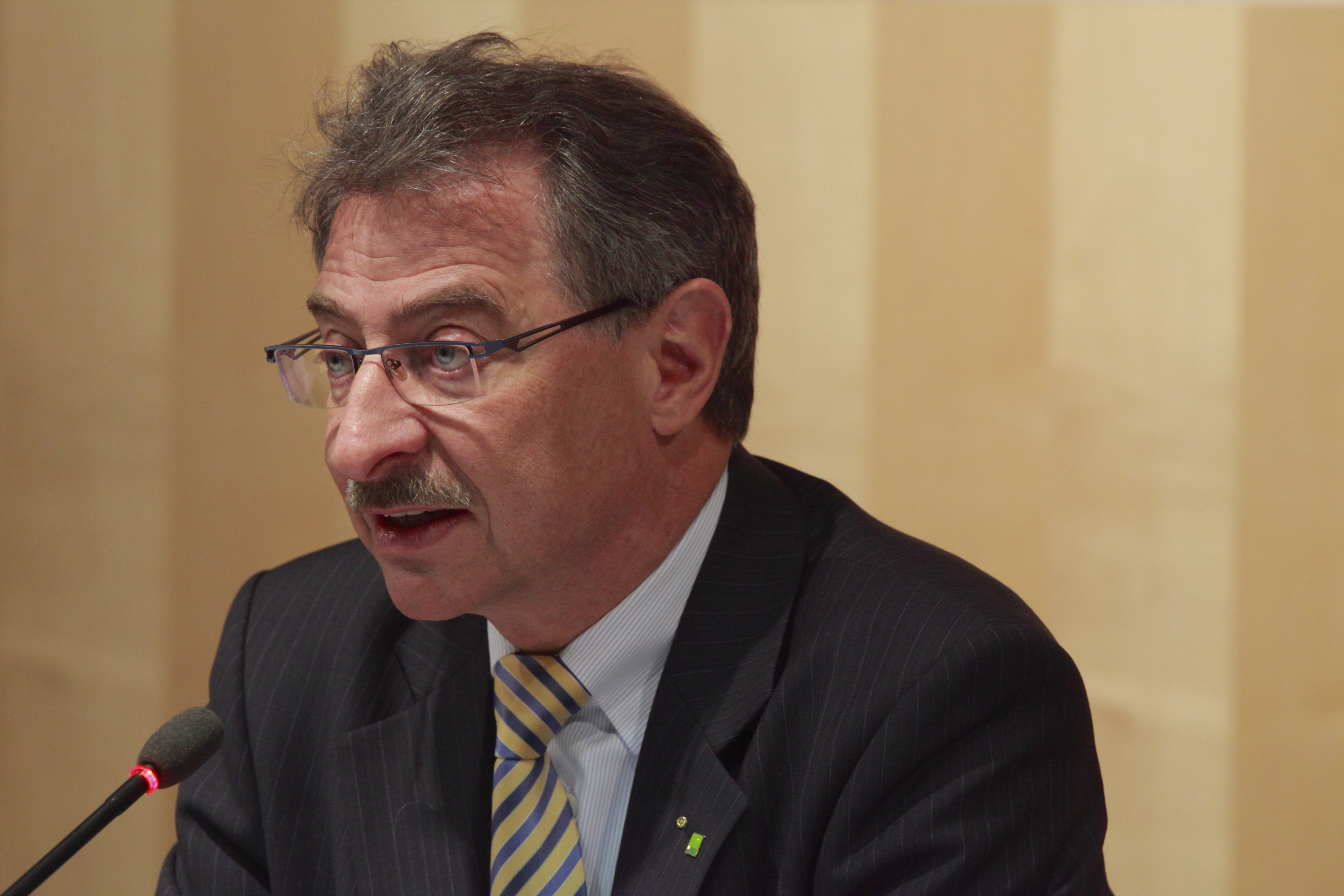 Prof. Dieter Kempf (Mitglied des Präsidiums, Bundesverband Informationswirtschaft, Telekommunikation und neue Medien e.V.) Foto: Norbert Luckhardt